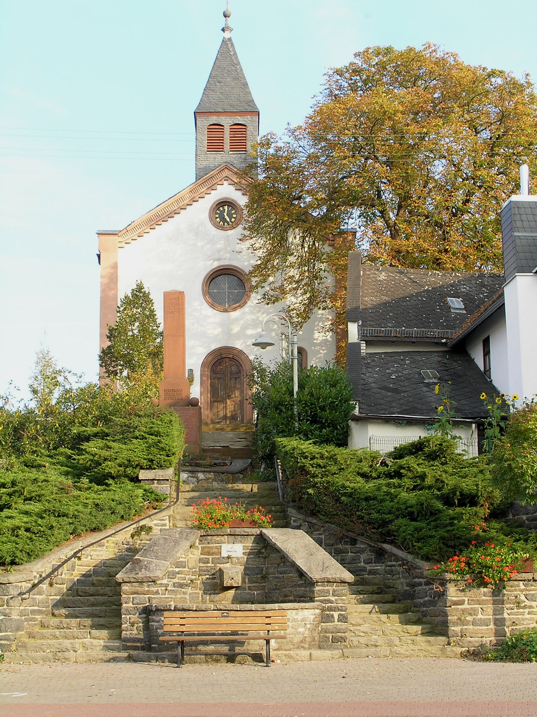 Kirche in Niederlauken, Weilrod, Deutschland